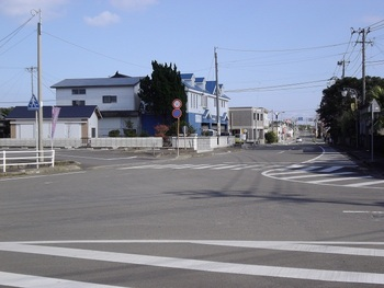 中種子町市街地